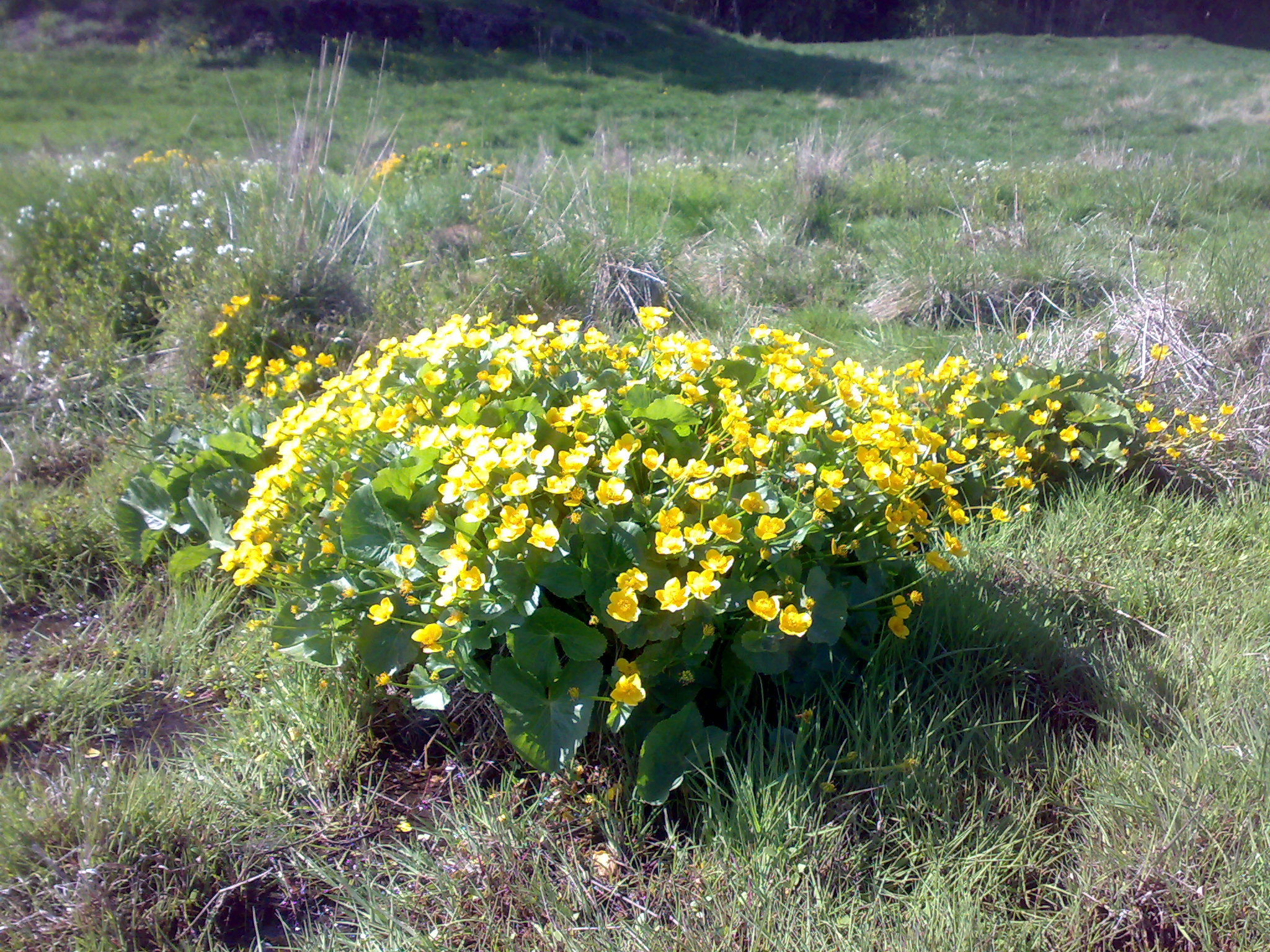 Soleiehov Caltha palustris Bekkeblom Oslo Norway